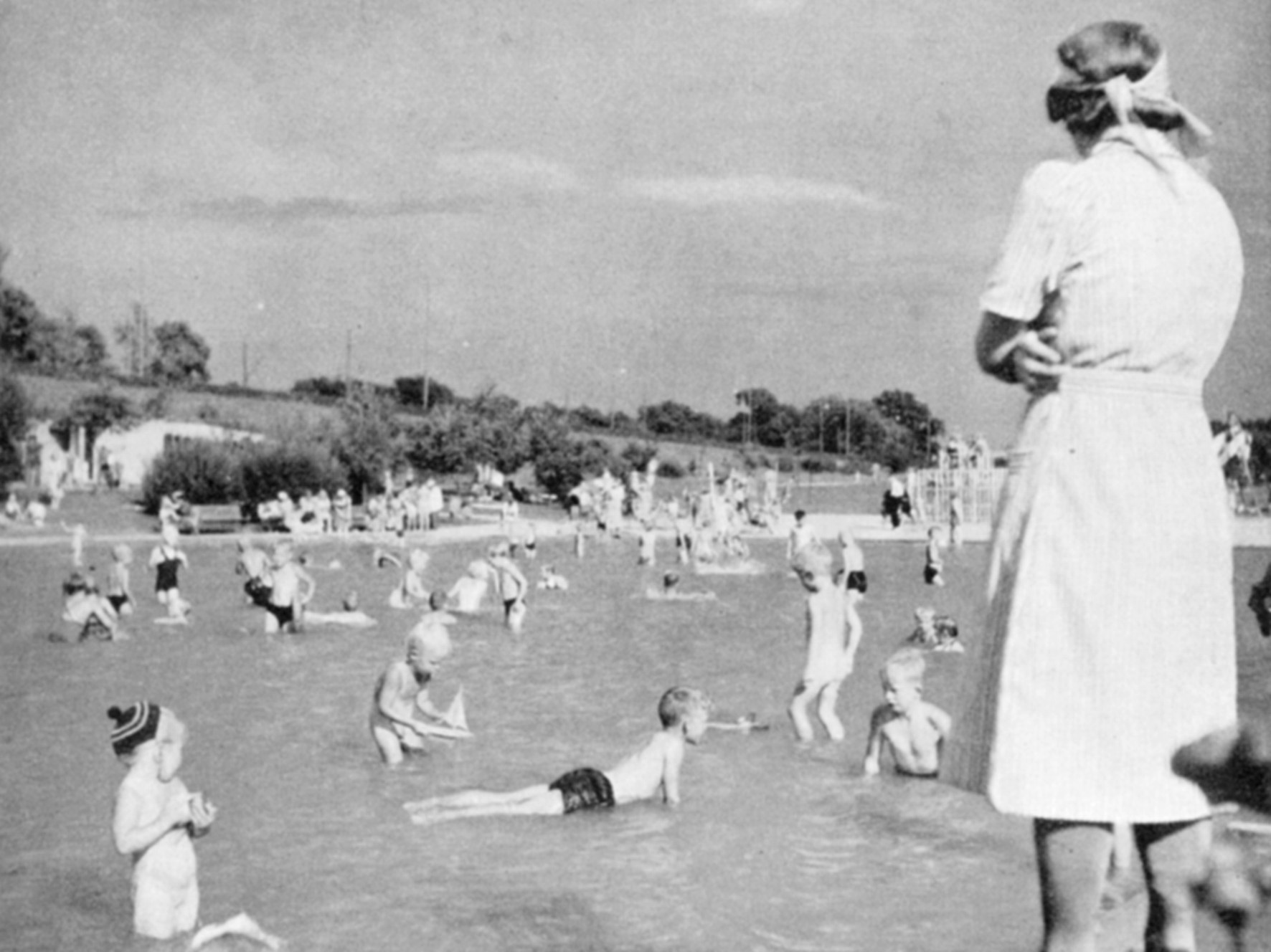 Plaskdammen i Fredhällsparken i Stockholm